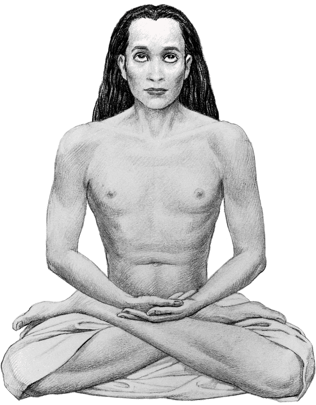 Mahavatar Babaji transparentes Bild.